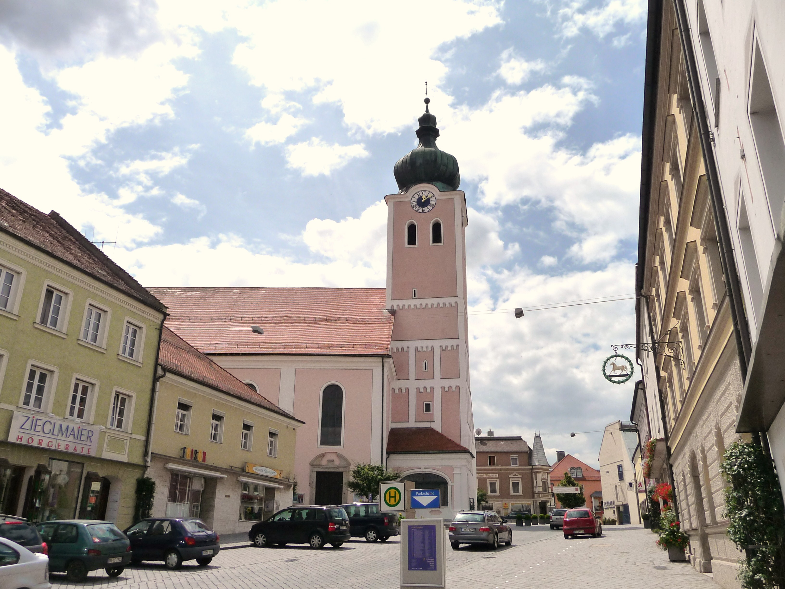 Die Stadtpfarrkirche Maria Himmelfahrt in Landau an der Isar